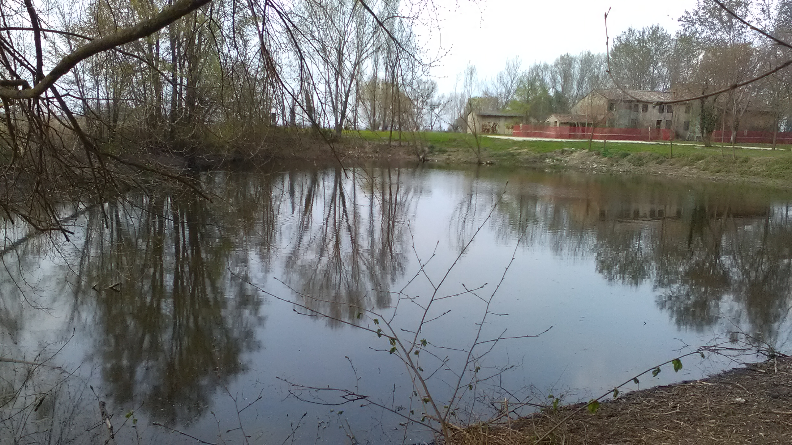 Gorgo Zùcolo a Trecenta (Rovigo)